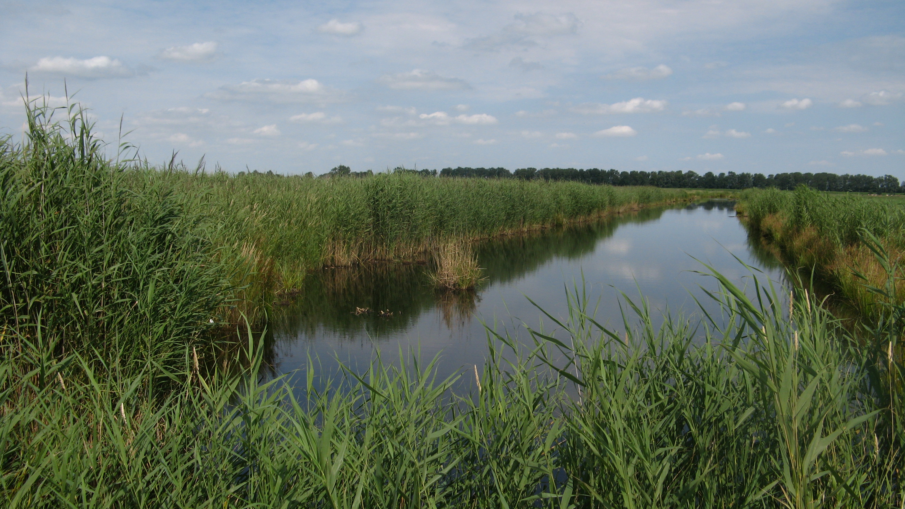 Naturschutzgebiet Delver Koog in Delve